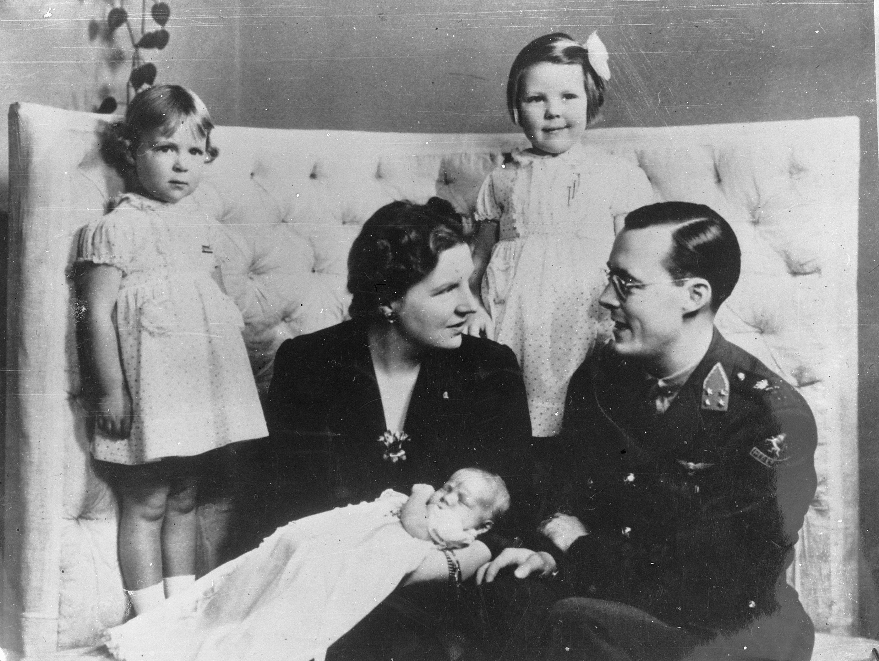 Collectie / Archief : Fotocollectie Anefo Reportage / Serie : [ onbekend ] Beschrijving : Koninklijk familie in Canada. Vlnr. prinses Irene, prinses Juliana, prinses Margriet, prinses Beatrix en prins Bernhard Datum : 1943 Locatie : Canada, Ottawa Trefwoorden : koninklijk huis, prinsen, prinsessen, tweede wereldoorlog Persoonsnaam : Beatrix, prinses, Bernhard, prins, Irene, prinses, Juliana, koningin, Margriet, prinses Fotograaf : Planet News, [onbekend] Auteursrechthebbende : Nationaal Archief Materiaalsoort : Glasnegatief Nummer archiefinventaris : bekijk toegang 2.24.01.09 Bestanddeelnummer : 934-8351